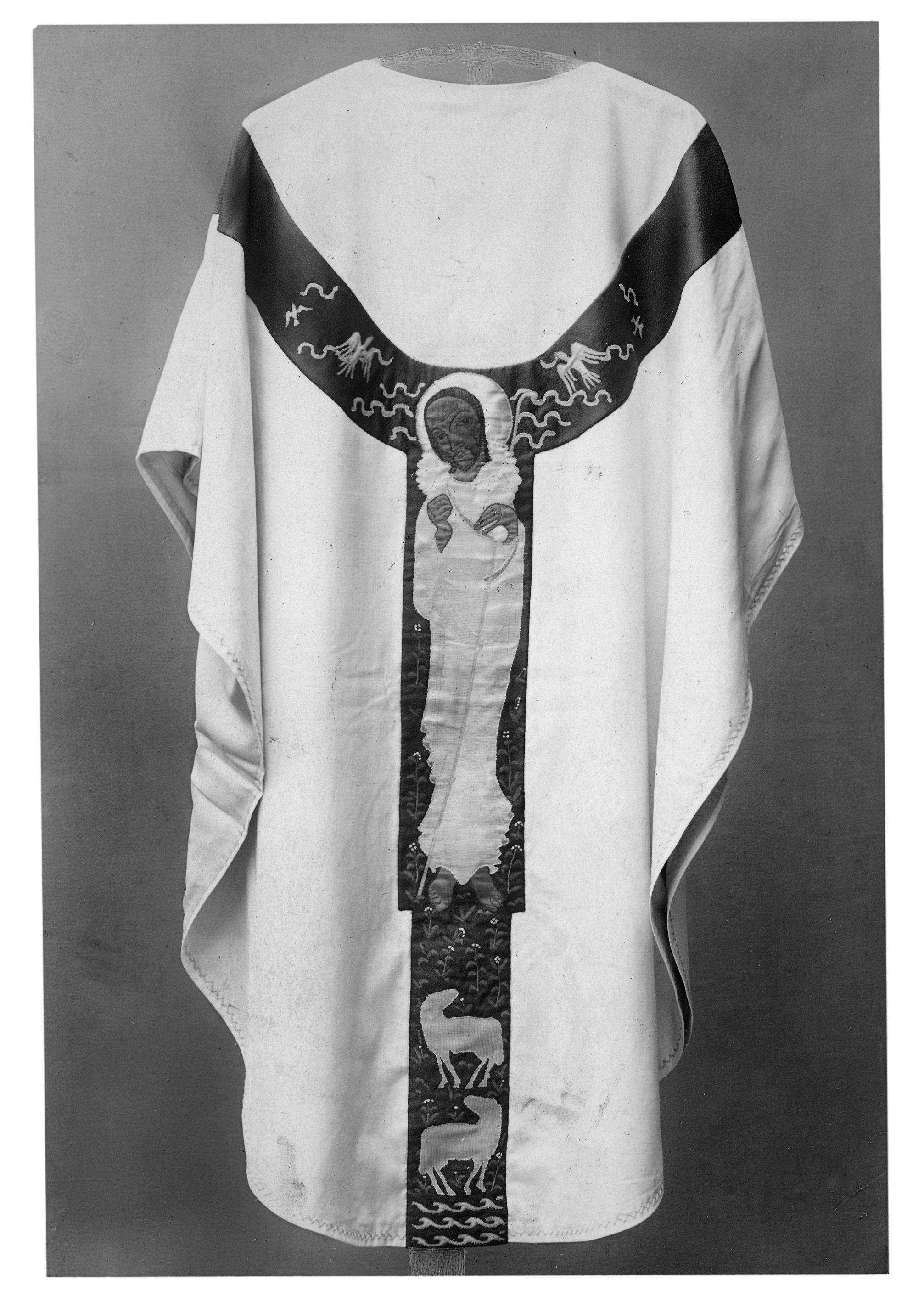 Kazuifel van het Hilversumse atelier J.L. Sträter